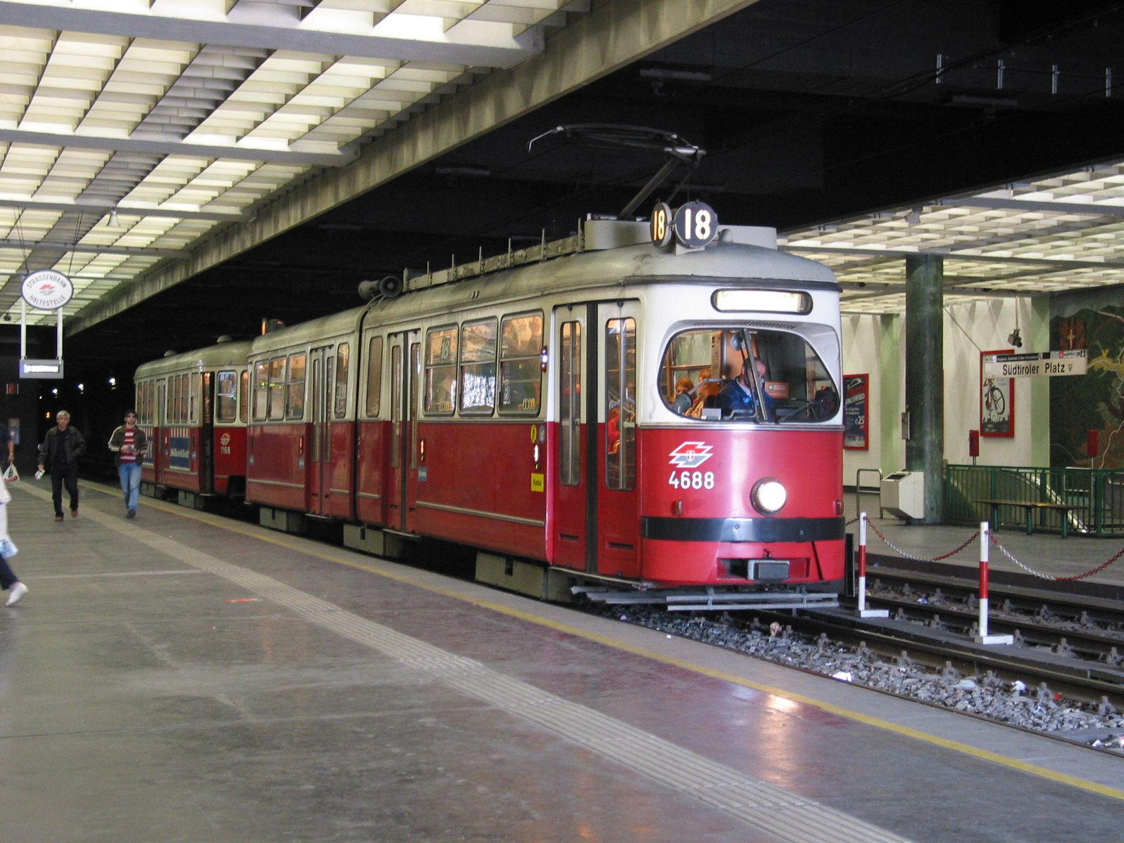 de: U-Straßenbahn Südtiroler Platz in Wien en: tram tunnel station Südtiroler Platz, Vienna